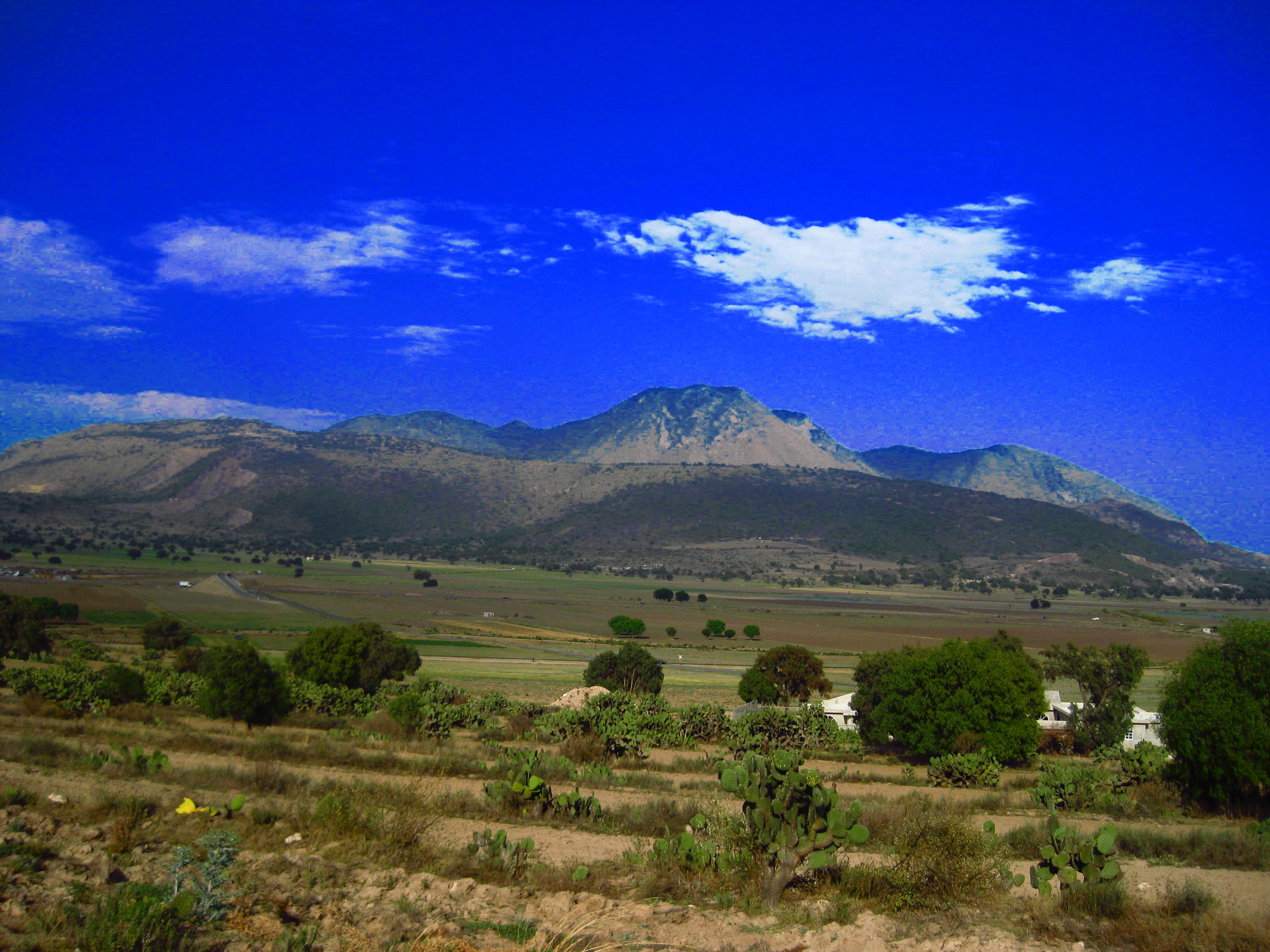 foto tomada desde tlanalapa al xihuingo